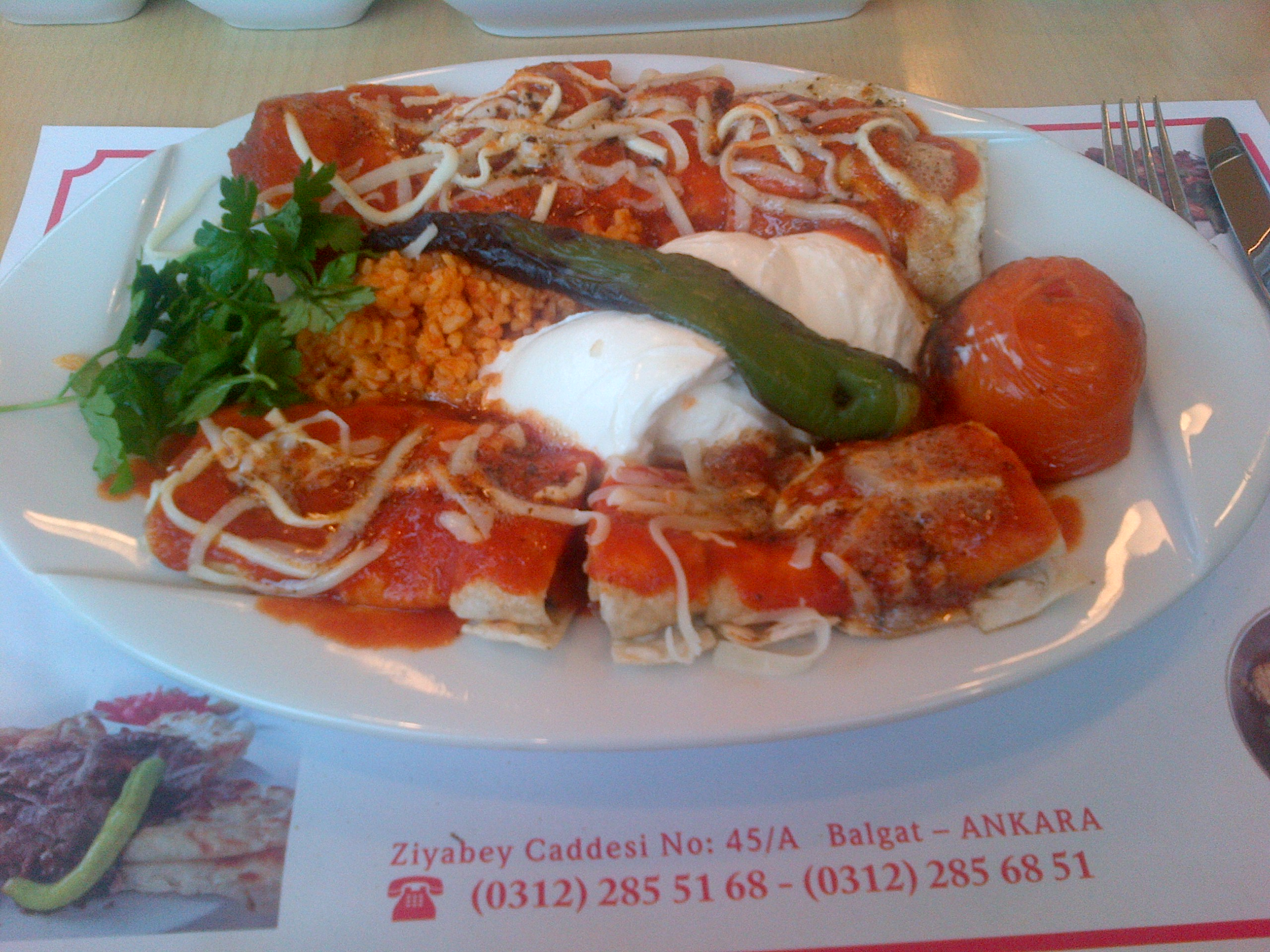 Un "beyti" hecho a base de döner de ternera.